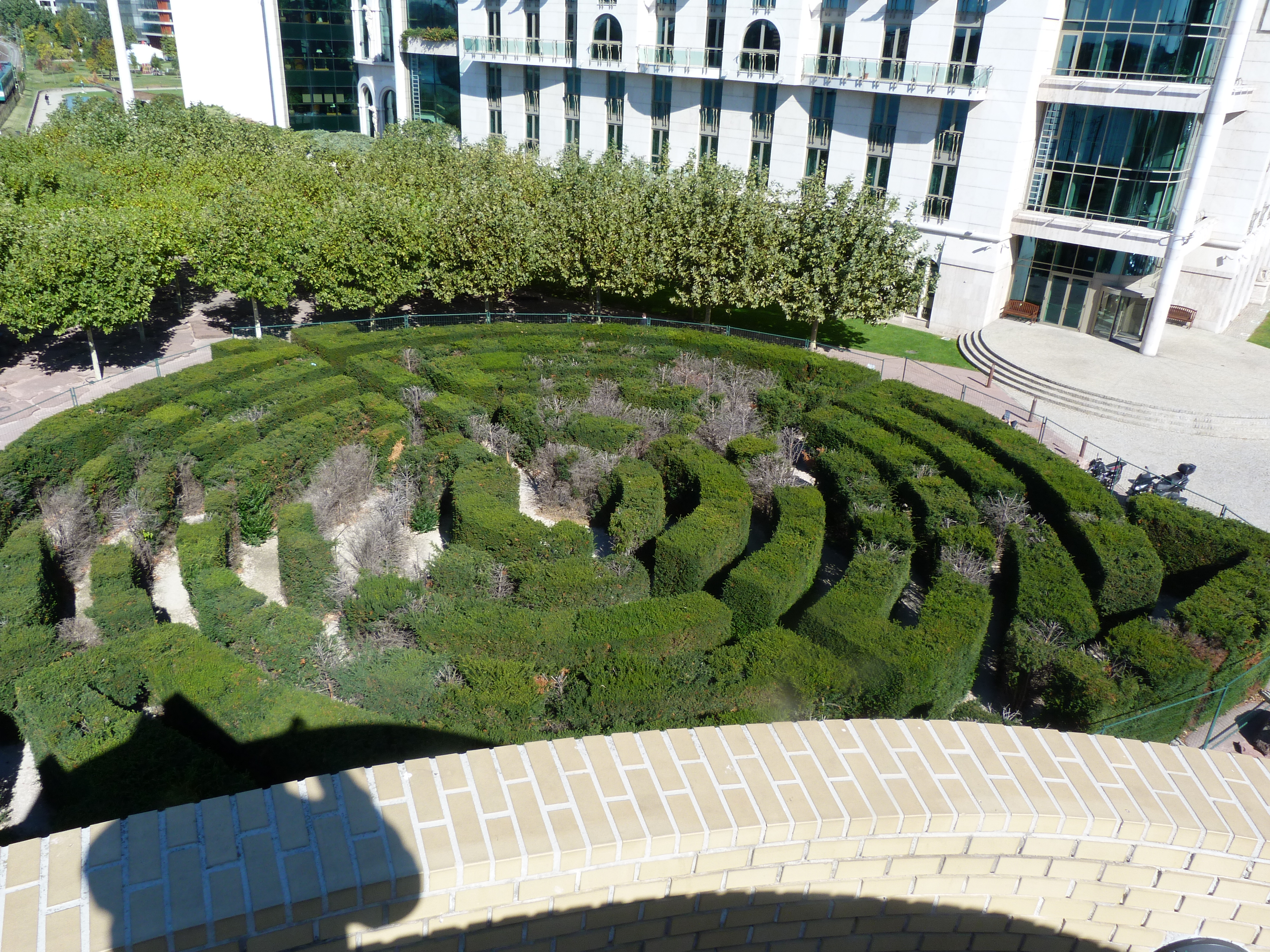 A felvétel 2013. Október 3 –án csütörtökön készült Budapesten. Nemzeti Színház mellett a Labirintus. ©© Derzsi Elekes Andor, Budapest, 2013, You are authorised to use these photos and vids under Creative Commons – even for commercial, for profit purposes. Photos must be attributed to Derzsi Elekes Andor. All of the photos and vids in the Metapolisz DVD line are under Creative Commons and can be used even for commercial – for profit – purposes. Recommended Citation Derzsi Elekes Andor: Metapolisz DVD line